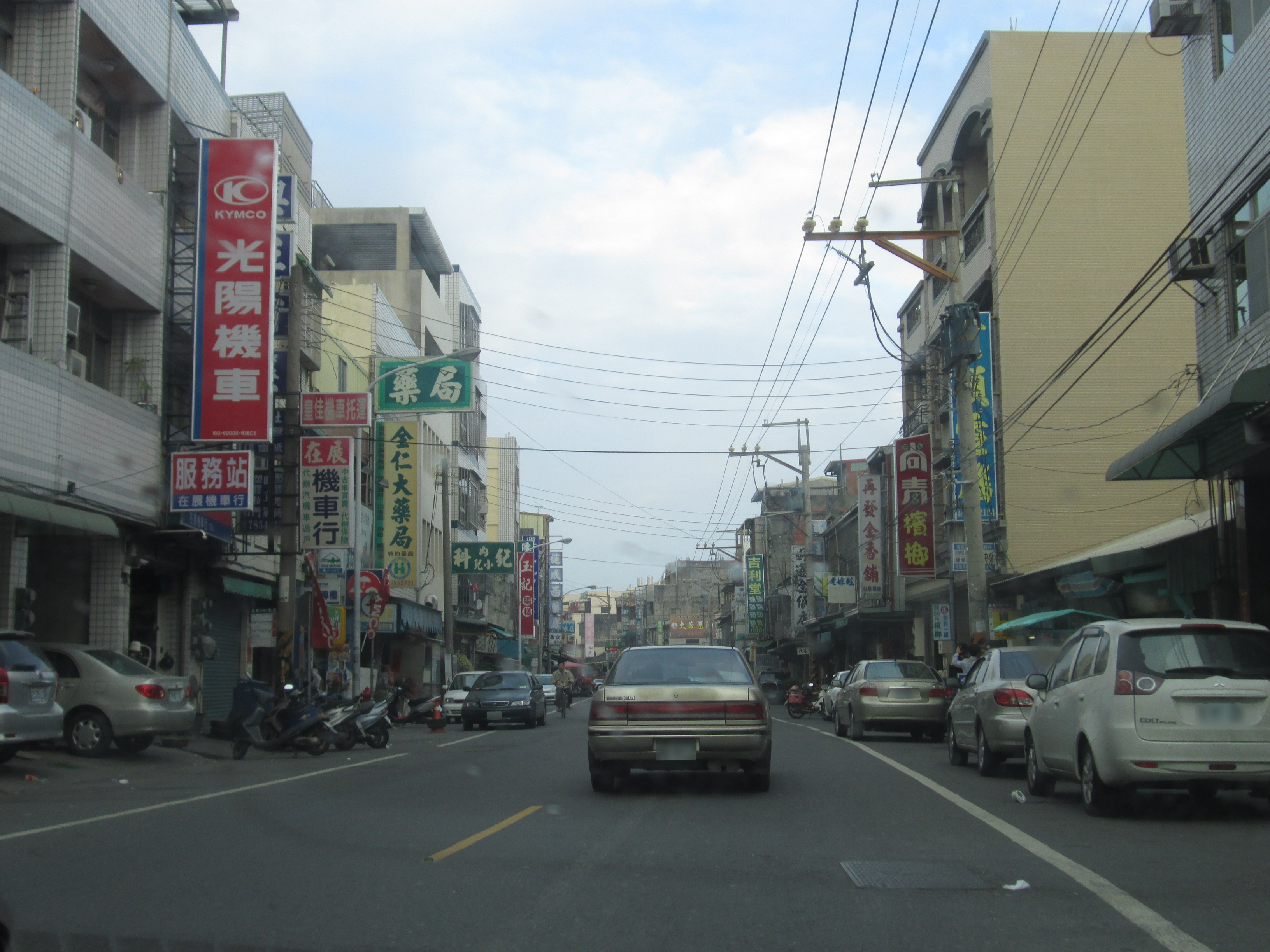 雲林縣水林鄉 水林路